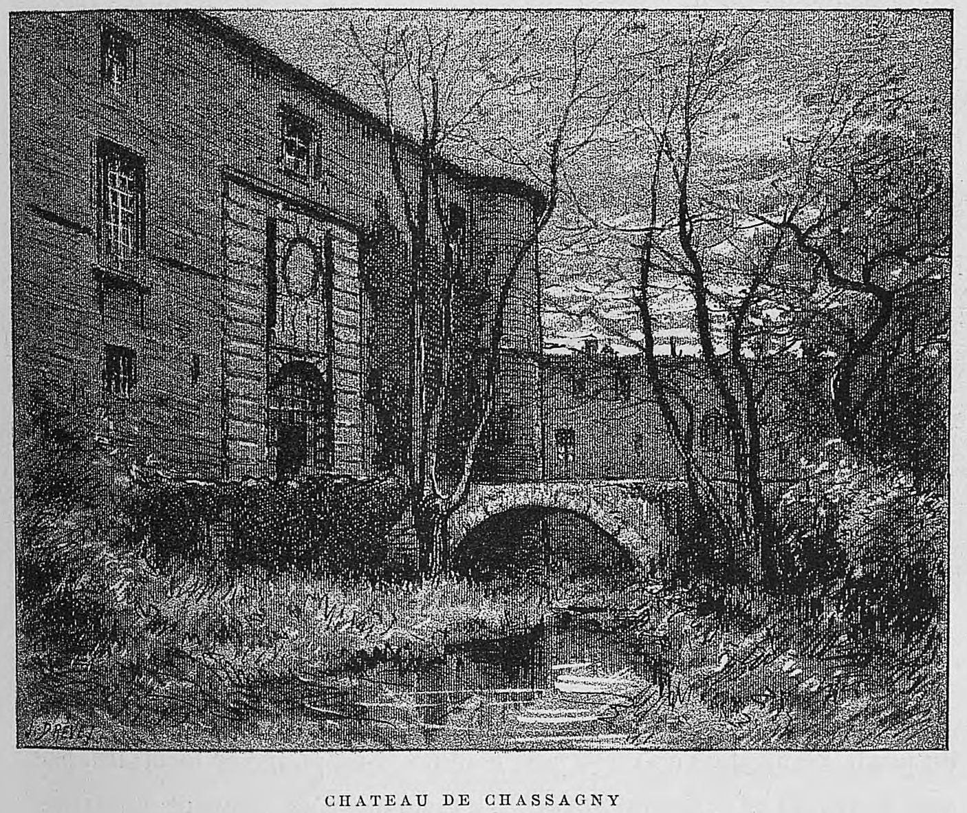 Aux environs de Lyon / Monsieur Josse ; préface de M. Coste-Labaume ; édition illustrée de 250 dessins de J. Drevet.